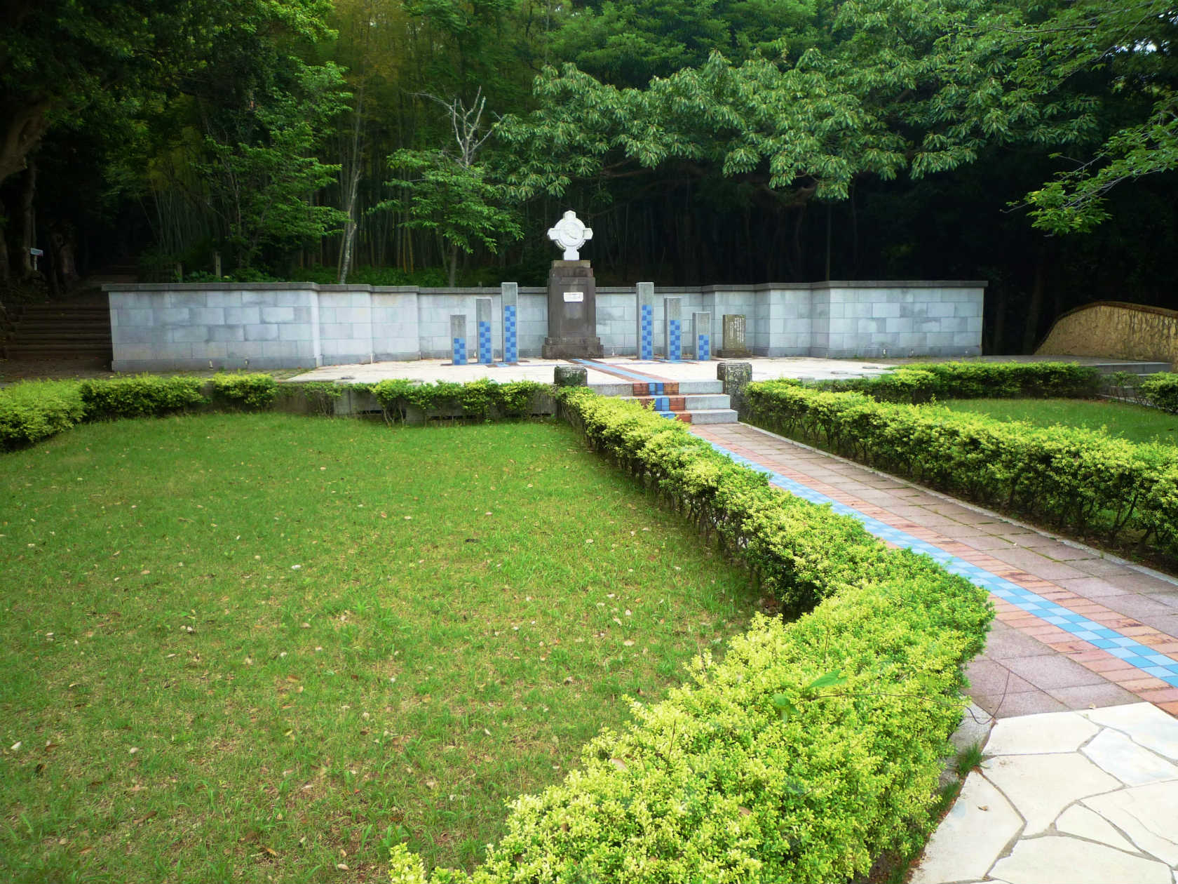 崎方公園（フランシスコ・ザビエル記念碑）